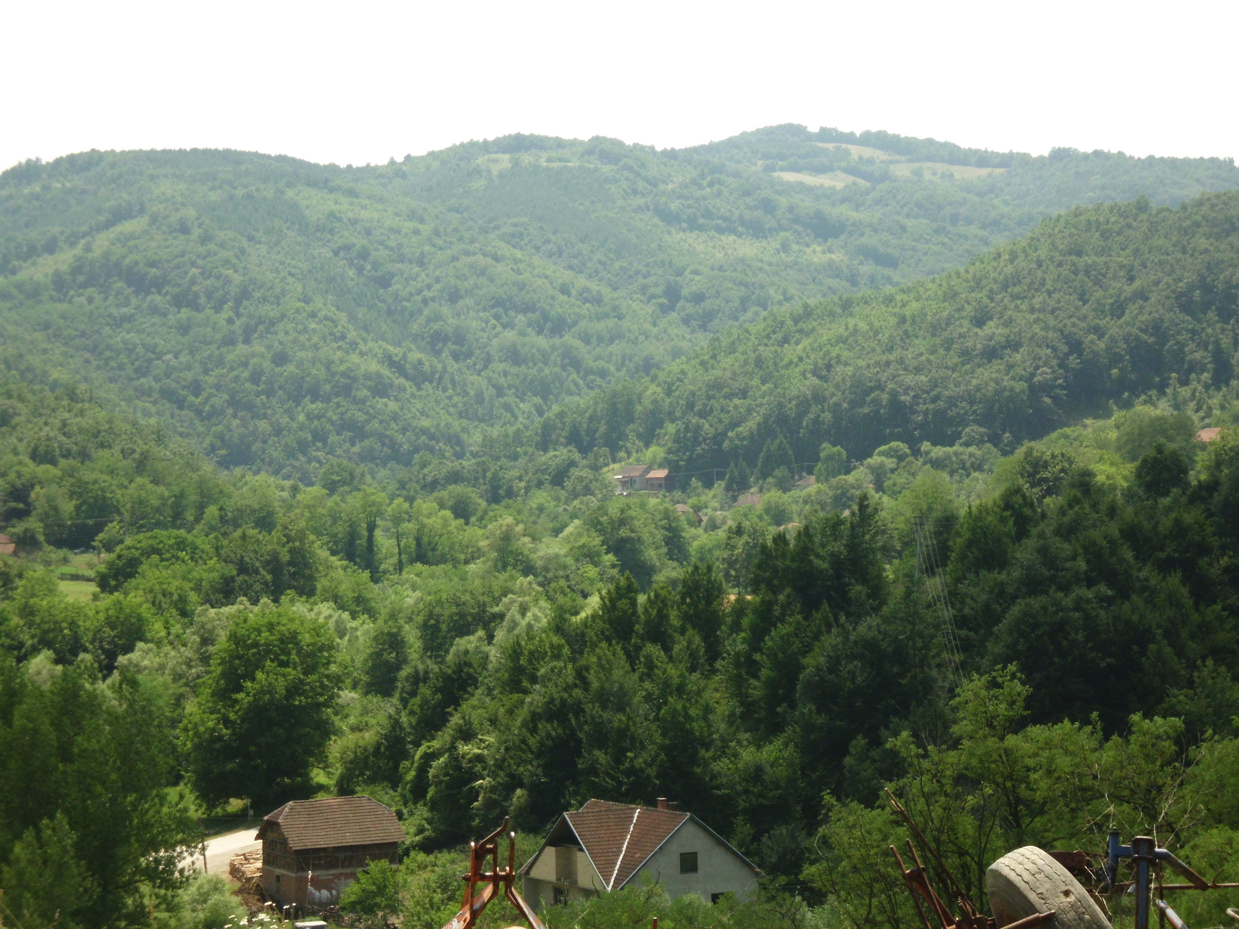 Гледићке планине